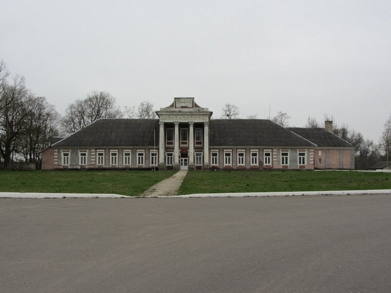 Вялікая Рагозніца. Сядзіба Сухадольскіх